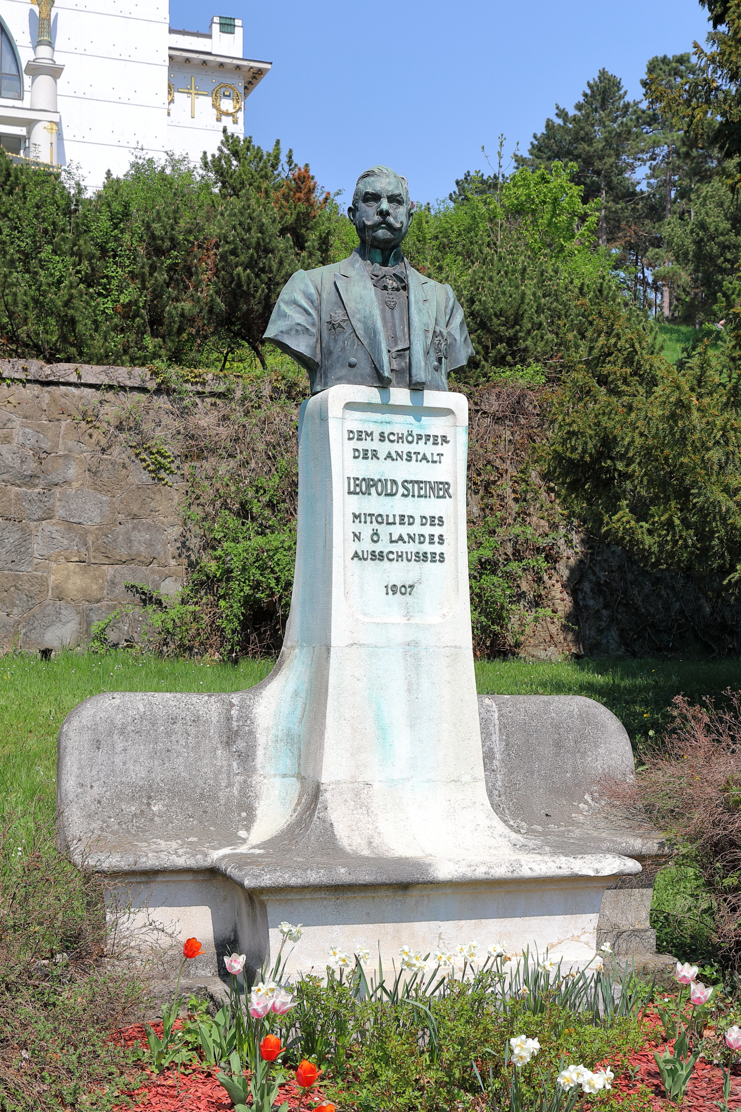 Denkmal für Leopold Steiner unterhalb der Kirche am Steinhof auf dem Gelände des Sozialmedizinischen Zentrums Baumgartner Höhe bzw. Otto-Wagner-Spitals im 14. Wiener Gemeindebezirk Penzing. Das Denkmal entstand 1907. Steiner, späterer Landeshauptmann von Niederösterreich, hatte die Bauoberleitung der Spitalsanlage inne.